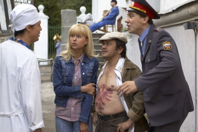 Фото со съемок кинокомедии Святое дело: Мирослава Карпович, Сергей Габриэлян, ?